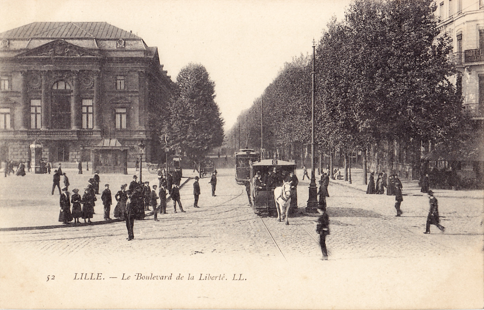 Carte postale ancienne éditée par LL, n°52 : LILLE - Le Boulevard de la Liberté